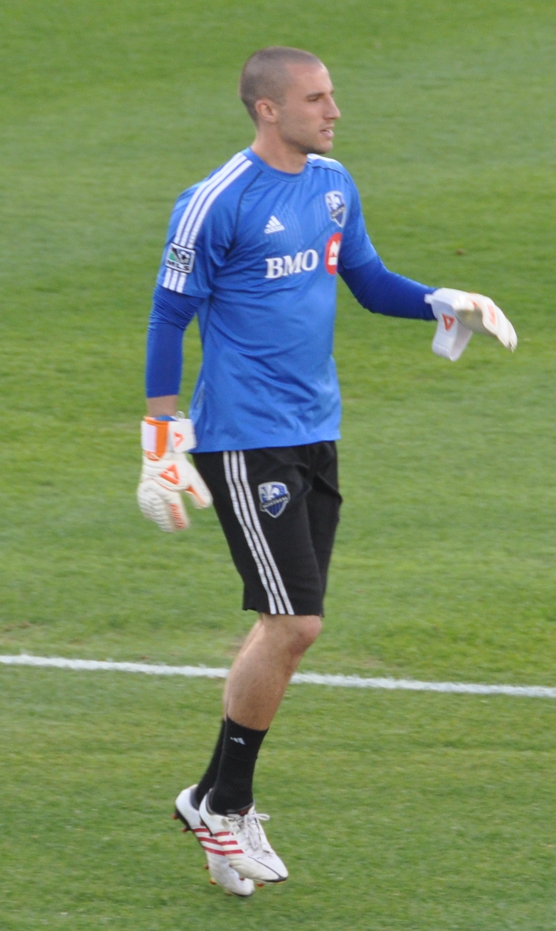 Avant le match Impact de Montréal - Toronto FC de la demi-finale du championnat canadien Amway au stade Saputo